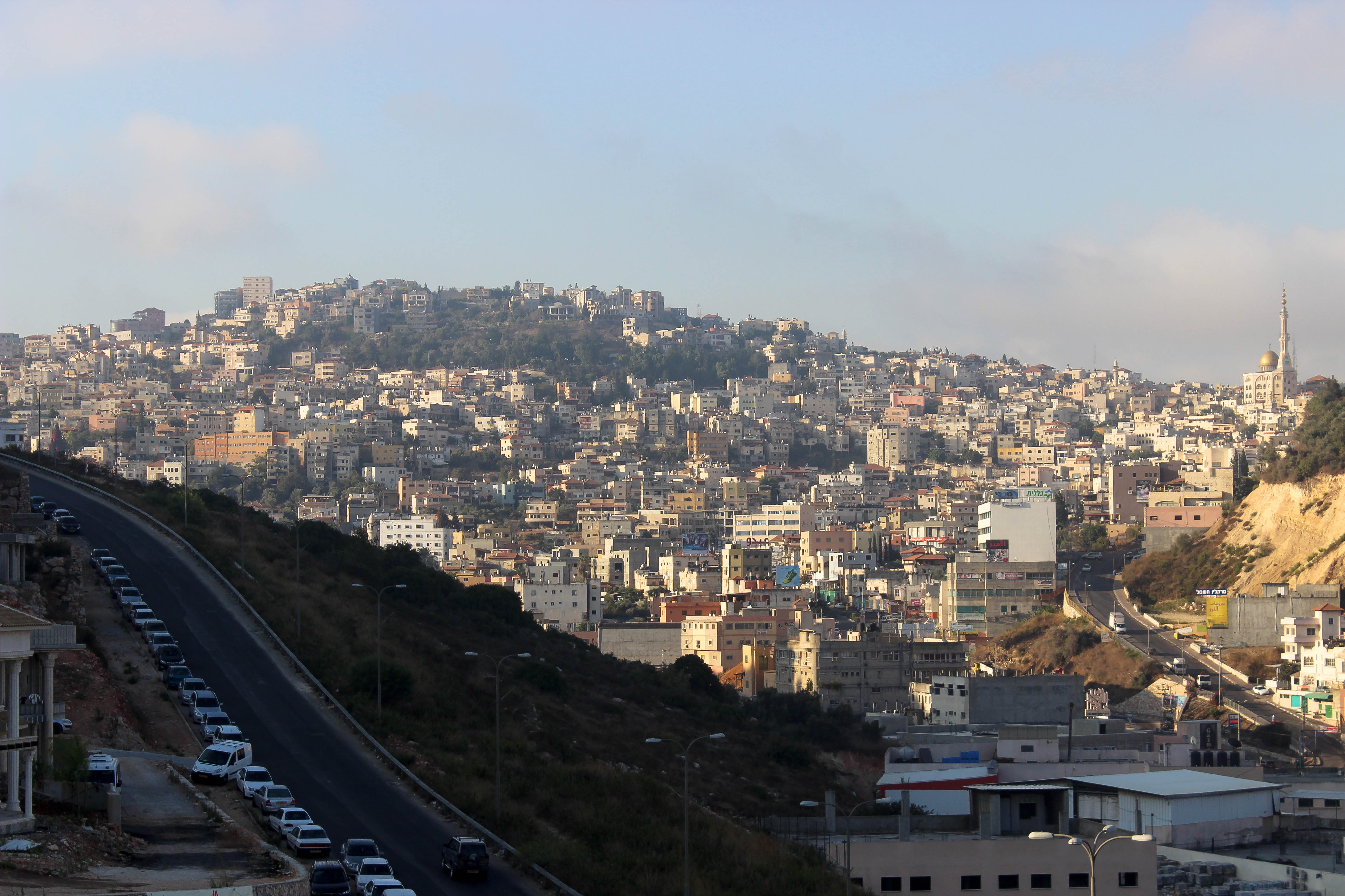 أم الفحم، حيفا، إسرائيل